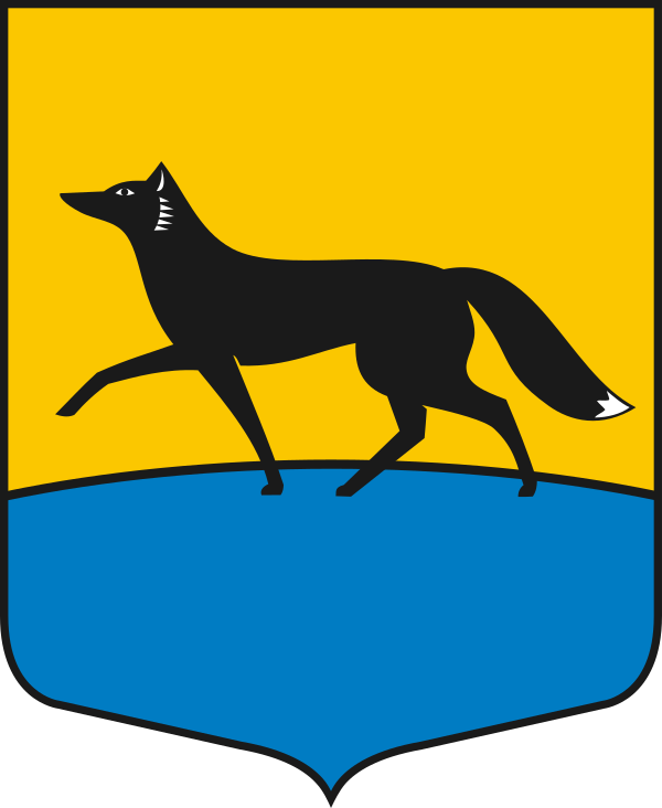 Герб Сургута